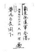 「南支派遣軍参謀 陸軍航空兵少佐 久門有文（花押） 警保局長閣下」 1938年11月4日付で陸軍省から内務省に慰安婦の徴集と中国への送り出しの依頼を行ったもの。